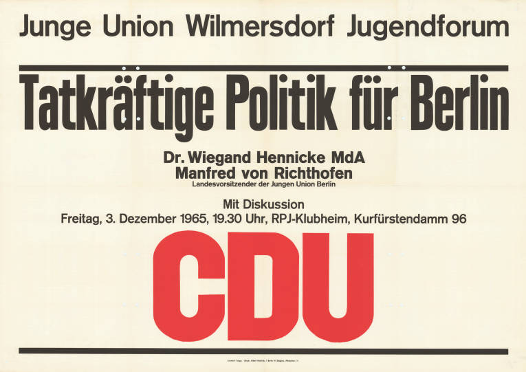 Junge Union Wilmersdorf Jugendforum Tatkräftige Politik für Berlin Dr. Wiegand Hennicke MdA Manfred von Richthofen Landesvorsitzender der Jungen Union Berlin mit Diskussion ... CDU Plakatart: Ankündigungsplakat Künstler_Grafiker: Entwurf: Trapp Auftraggeber: JU Wilmersdorf Drucker_Druckart_Druckort: Albert Hentrich, Berlin-Steglitz Objekt-Signatur: 10-028 : 317 Bestand: Plakate von Jugendorganisationen der Parteien ( 10-028) GliederungBestand10-18: Plakate von Jugendorganisationen der Parteien (10-028) » CDU » Veranstaltungsplakate A - Z Lizenz: KAS/ACDP 10-028 : 317 CC-BY-SA 3.0 DE